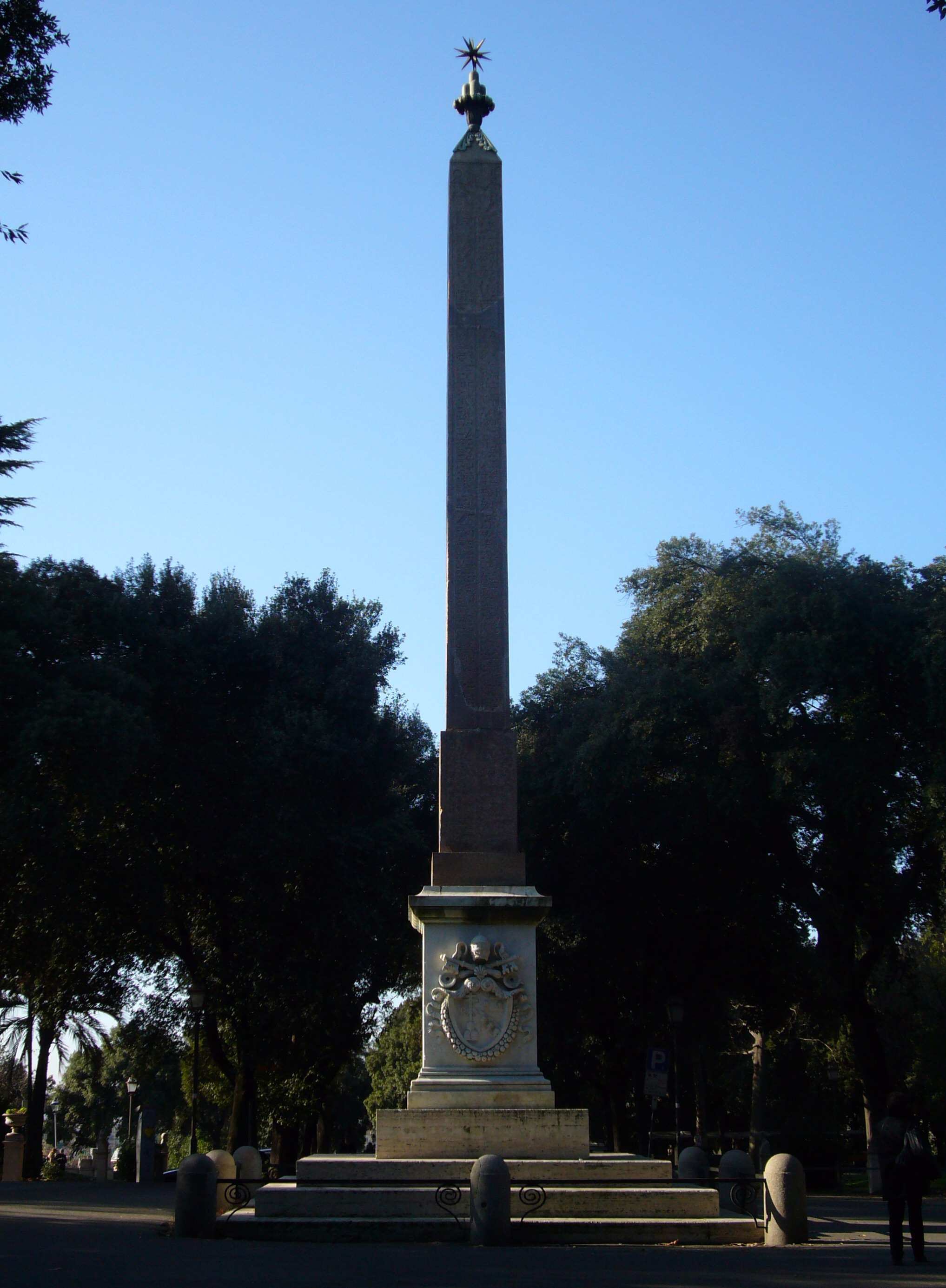 Roma, Villa Borghese: Obelisco Pinciano